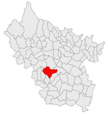 Categorie:Hărţi ale judeţului Buzău